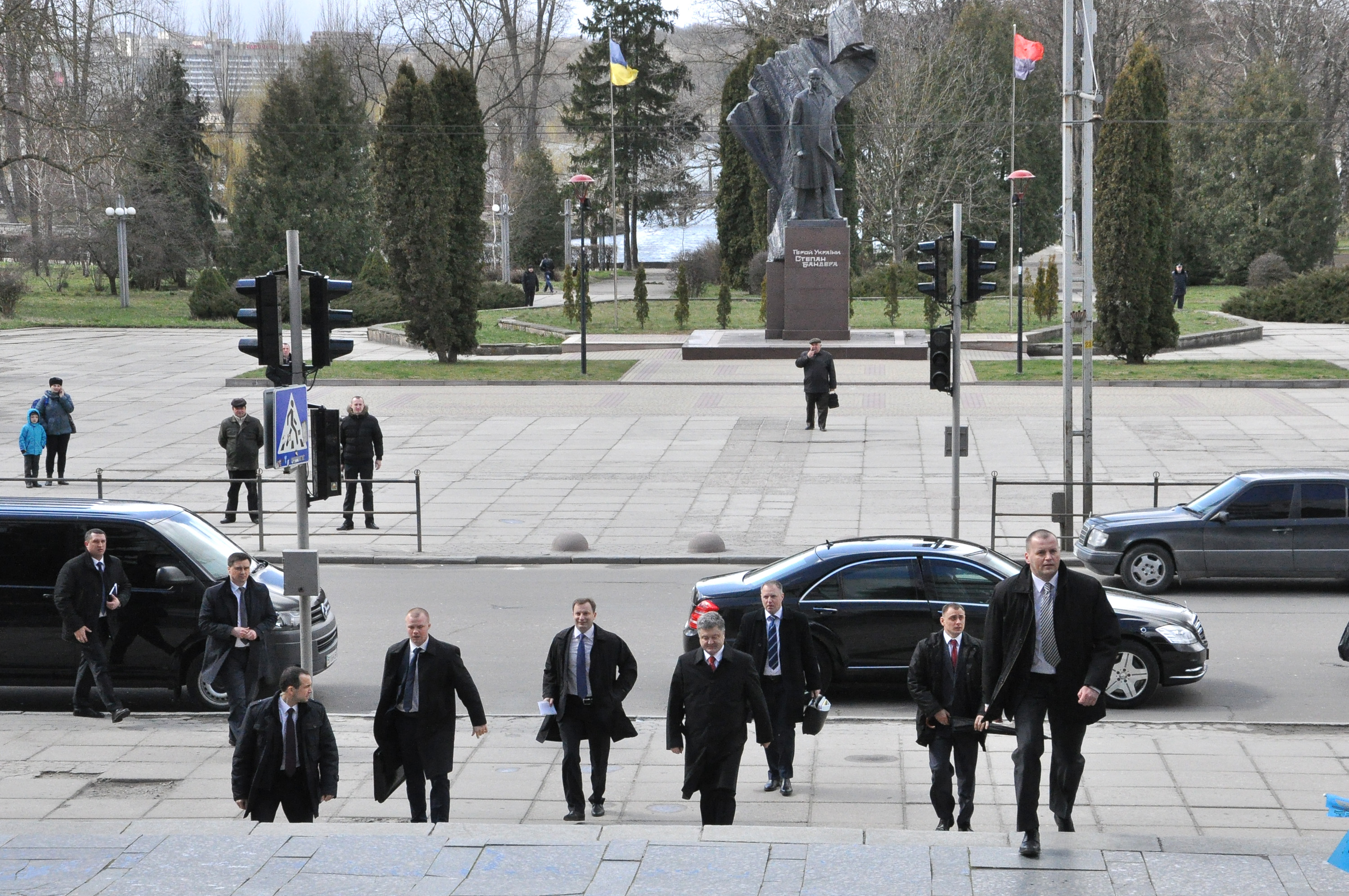 Петро Порошенко під час візиту до Тернополя 2 квітня 2015 року для представлення нового очільника Тернопільської області Степана Барни. Приїзд до Тернопільської обласної державної адміністрації.